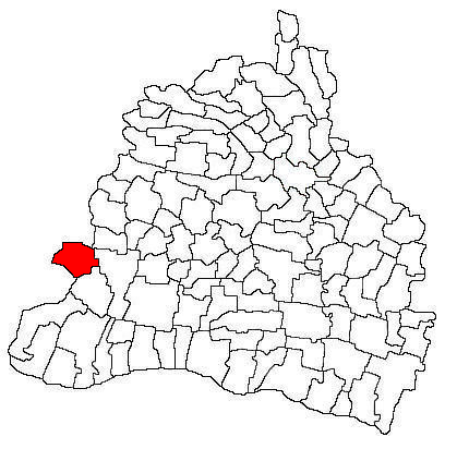 Amplasarea în cadrul județului.